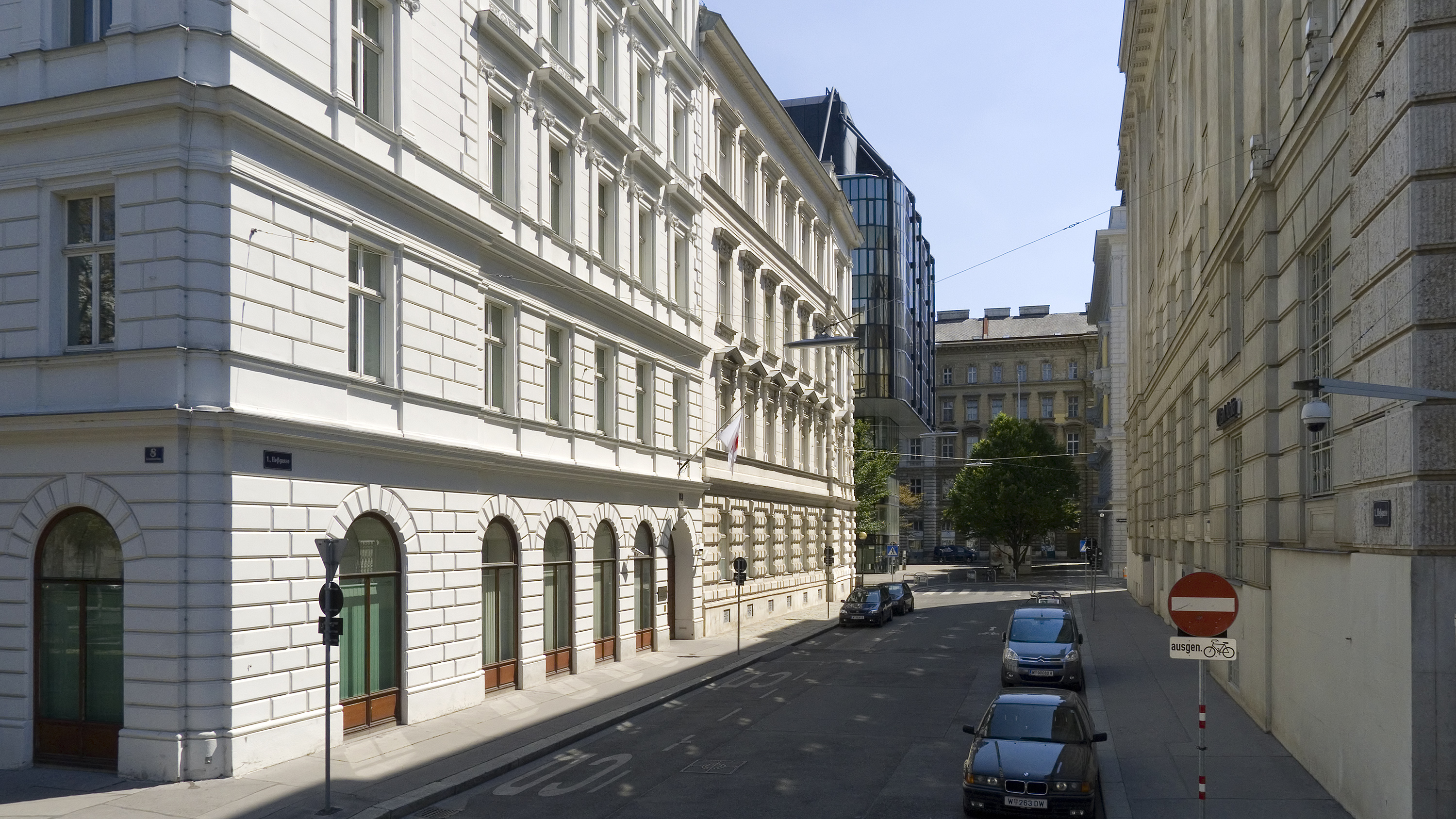 Heßgasse in Wien 1 beim Schottenring Richtung Südosten